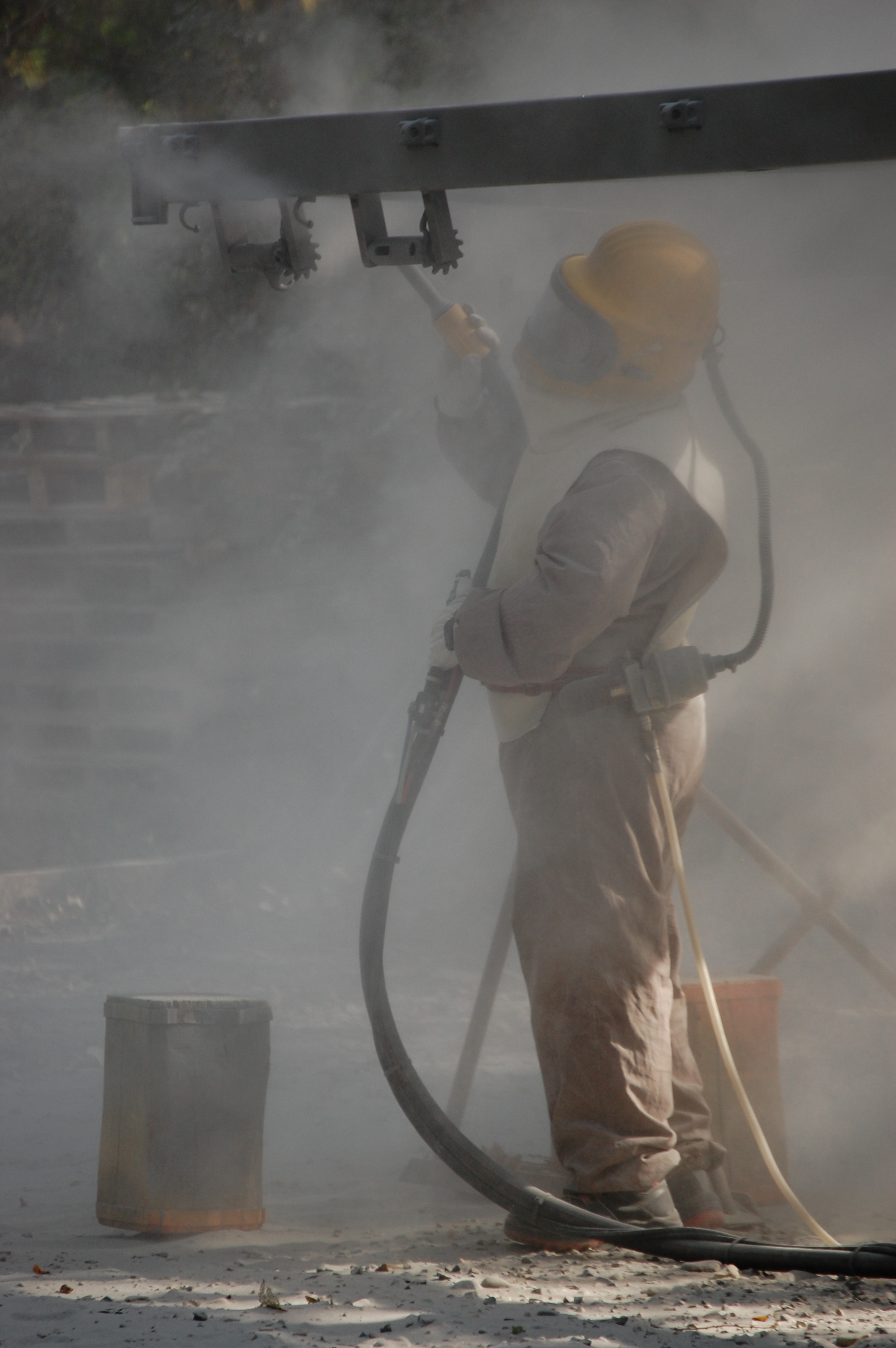 sabbiatura. esempio di operazione di sabbiatura su un telaio per autocamion